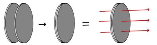 Her bliver der illustreret hvordan KBr pladerne i sig selv ikke absorbere IR-strålingen.